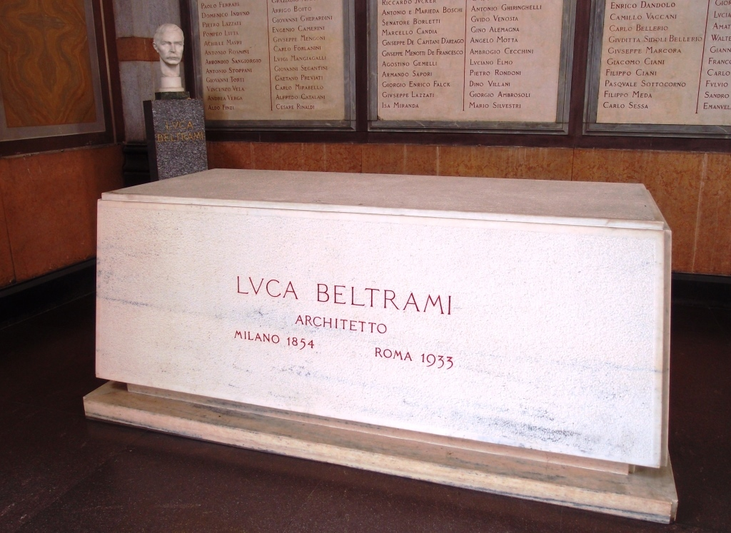 Sarkophag und Büste des italienischen Architekten und Kunsthistorikers Luca Beltrami (1854-1933) auf dem Cimitero monumentale von Mailand